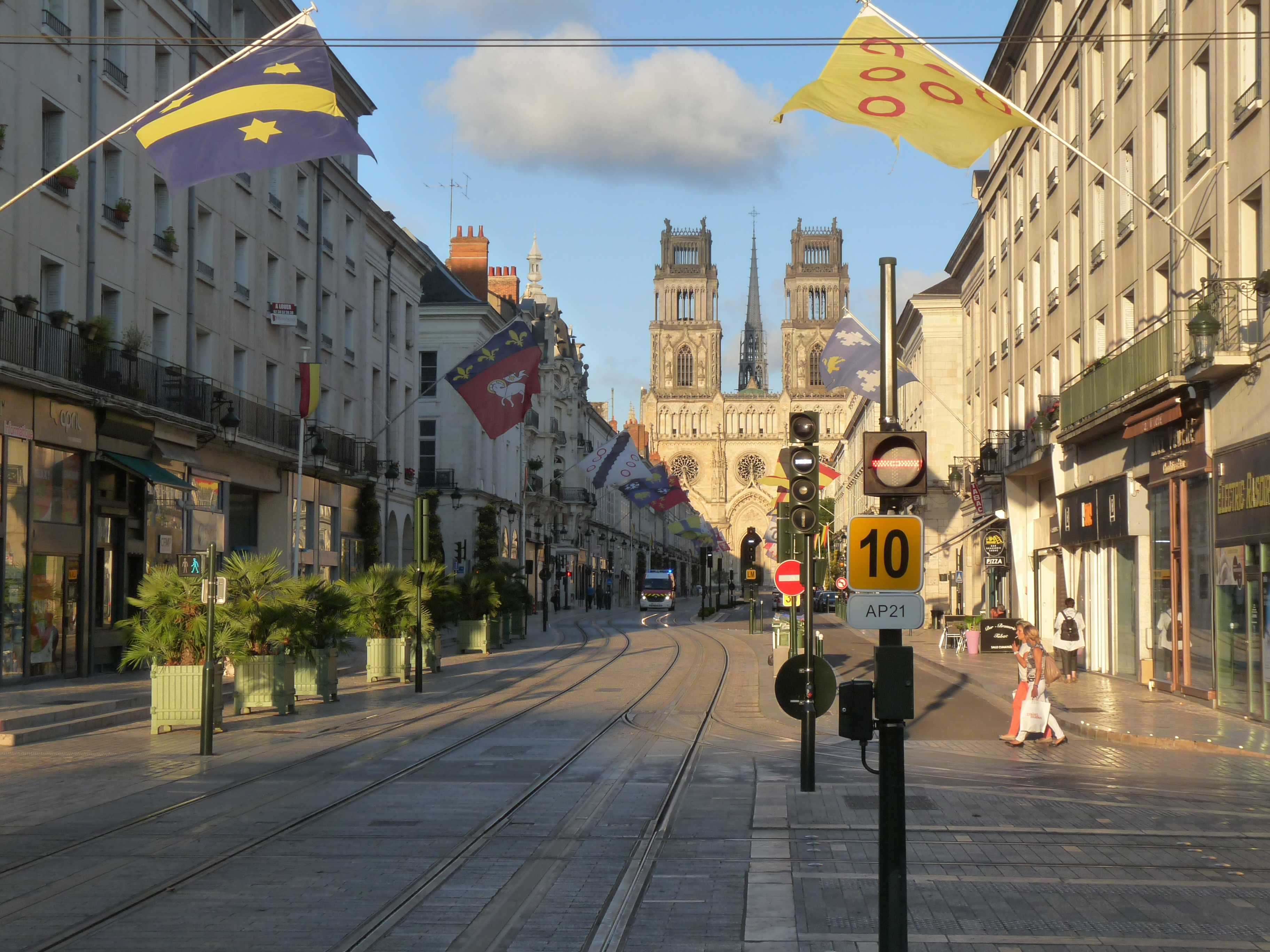 De Rue Jeanne-d'Arc in Orléans (Loiret, Frankrijk).